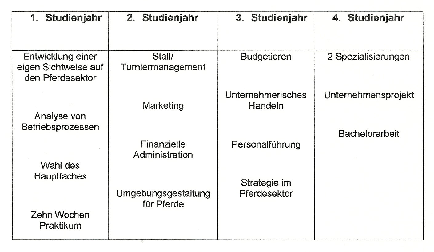 Modulplan Dronten